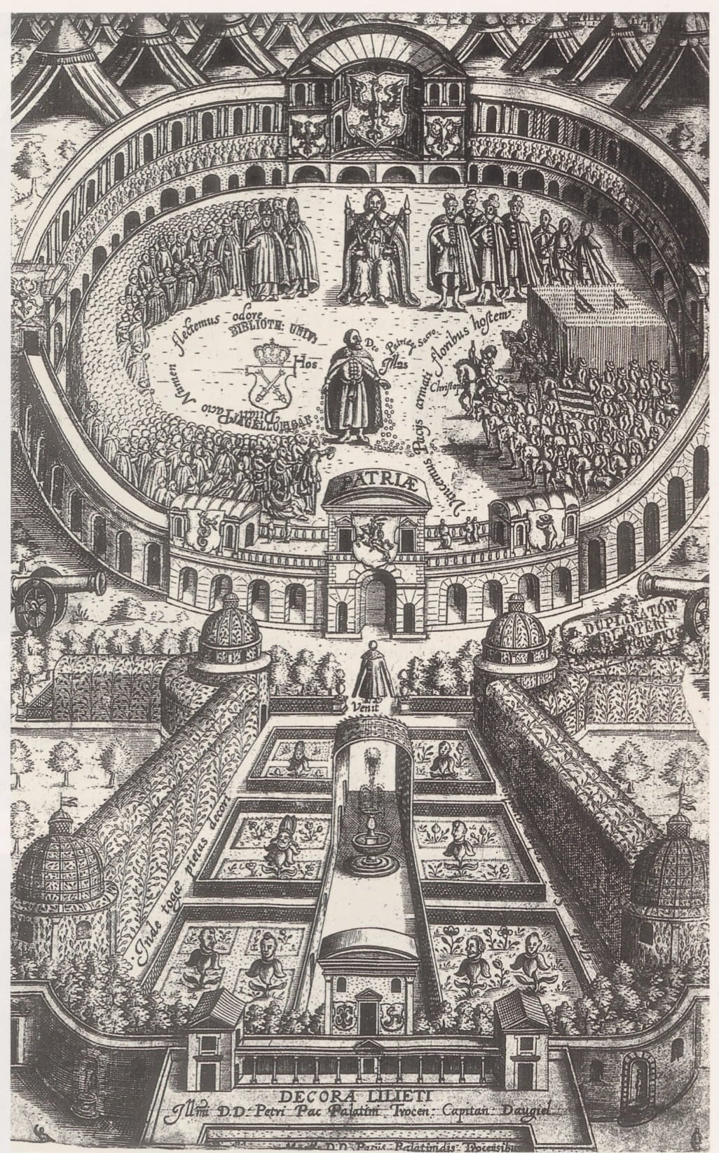 Беларуская (тарашкевіца): Панэгірык на сьмерць ваяводы троцкага Пятра Паца (Piotar Pac)